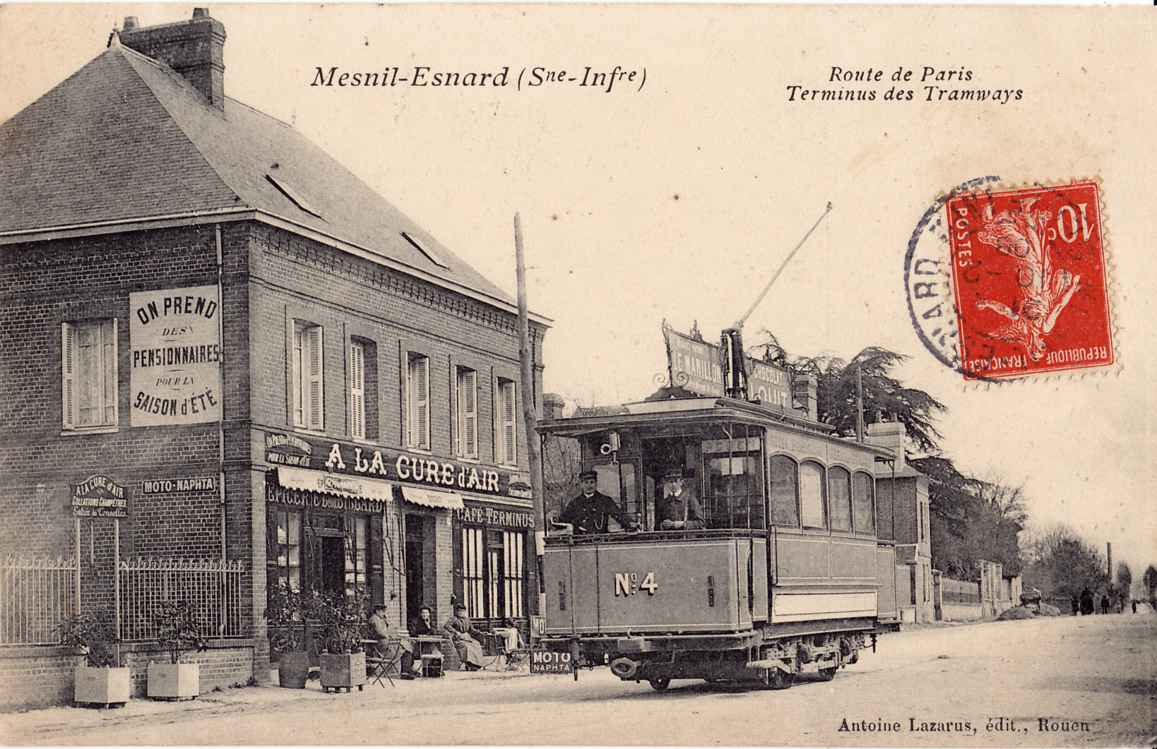 Carte postale ancienne éditée par Antoine Lazarus à Rouen : MESNIL-ESNARD - Route de Paris - Terminus des Tramways